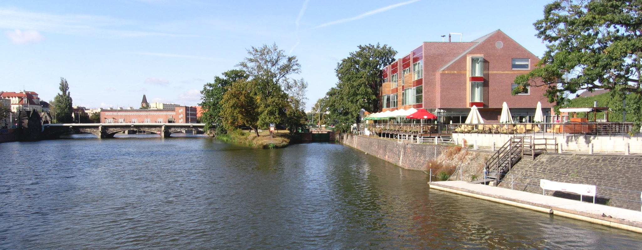 Odra w okolicach Mariny Śródmiejskiej Marina Śródmiejska we Wrocławiu (po prawej), w głębi Most Pomorski (południowy), za nim Południowa Elektrownia Wodna